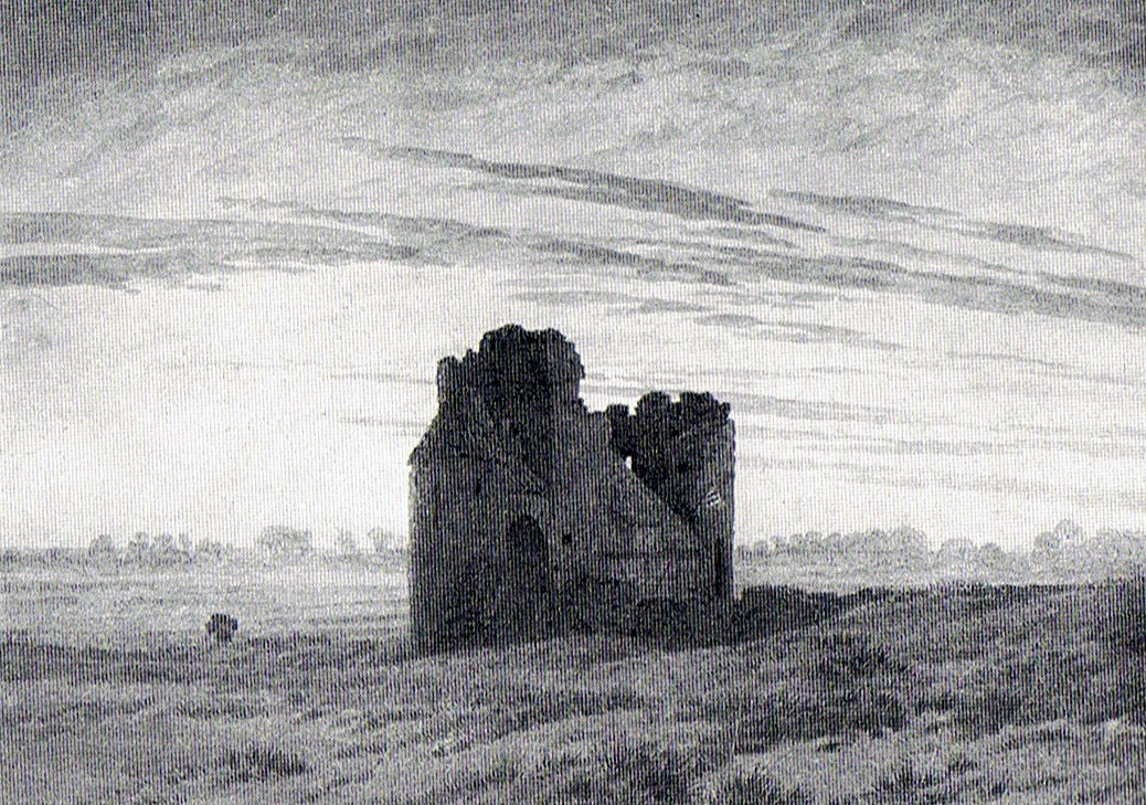 Caspar David Friedrich: Kirchenruine in Wiesenlandschaft. Um 1835, Bleistift, Sepia, 18,4 x 24,5 cm